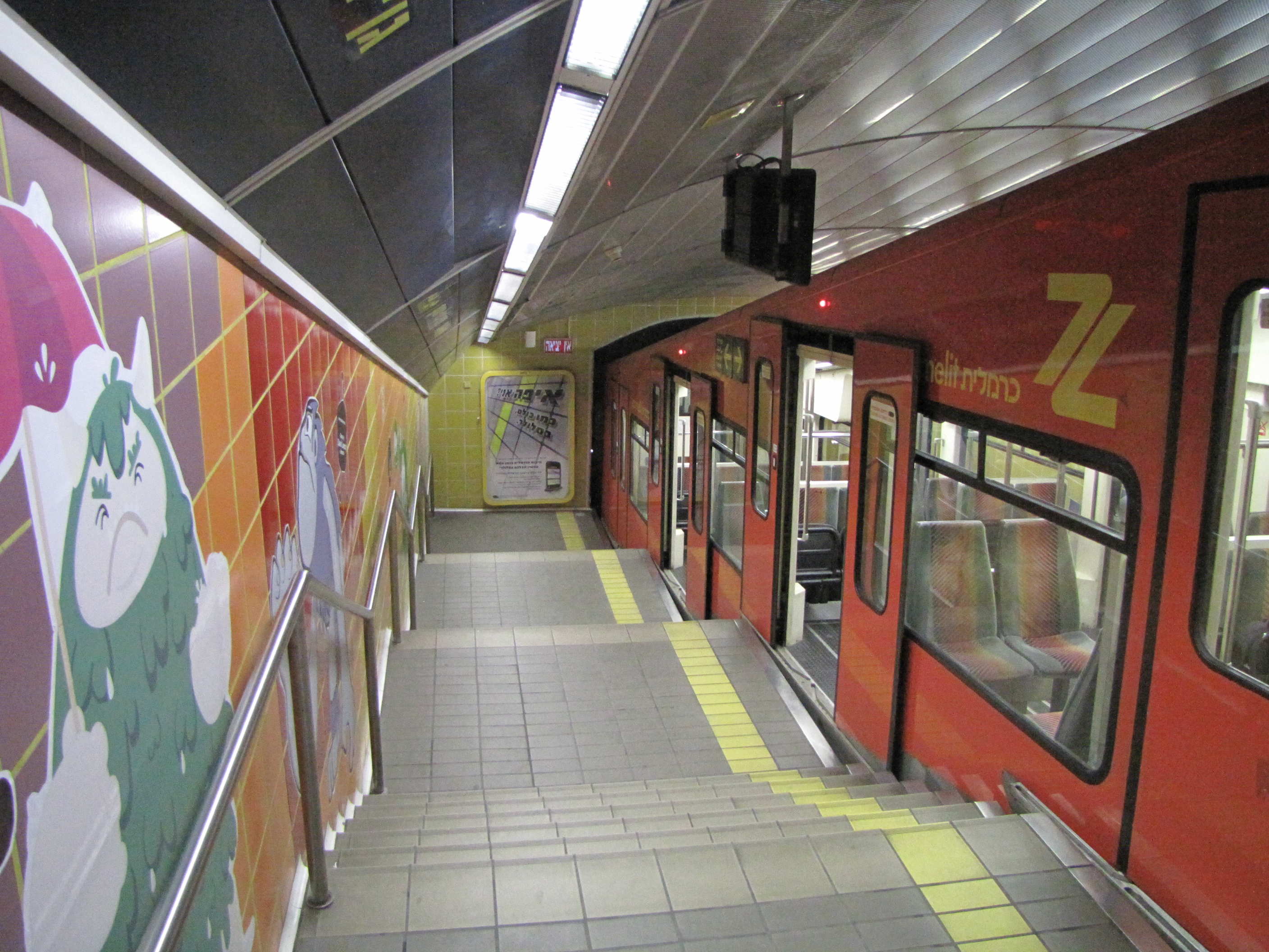 Carmelit, Haifa, Israel.